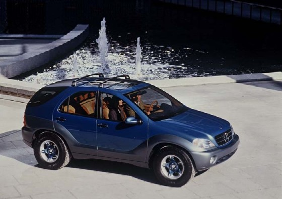 AA Vision Genehmigung: Gern können Sie für Ihre Tätigkeit für die Wikipedia Inhalte der DaimlerChrysler Medienseiten verwenden. Dazu erkennen wir die Bedingungen nach GNU-FDL an. Das Angebot bezieht sich auch auf die vorhandenen Bilder.(Dr.Josef Ernst, Communications, DaimlerChrysler AG)